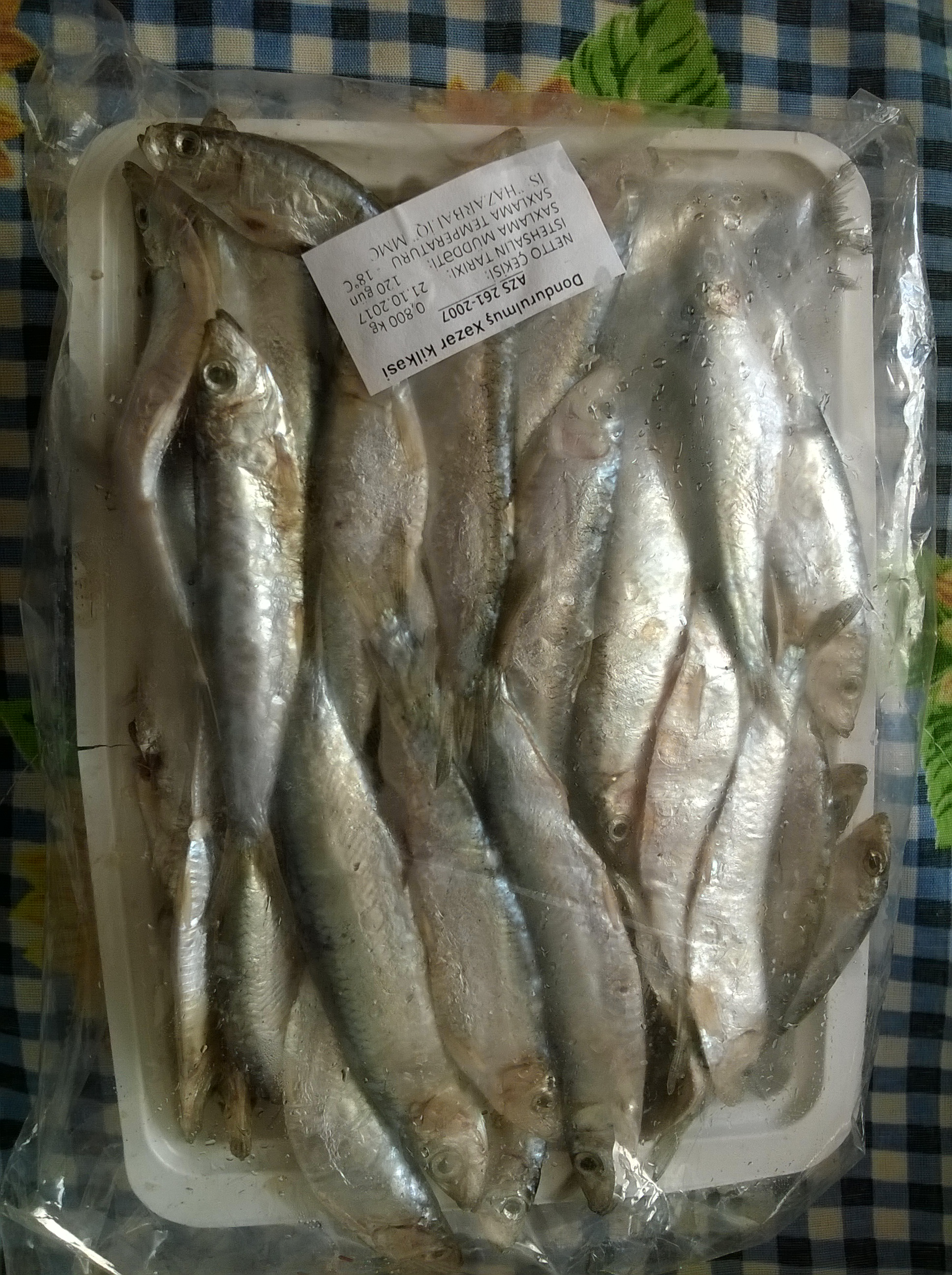 Xəzər kilkəsi